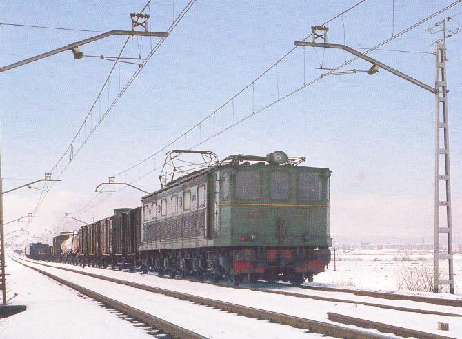 Locomotora elèctrica 270-001